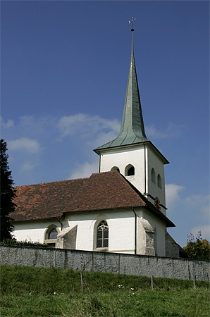 Kirche von Guggisberg